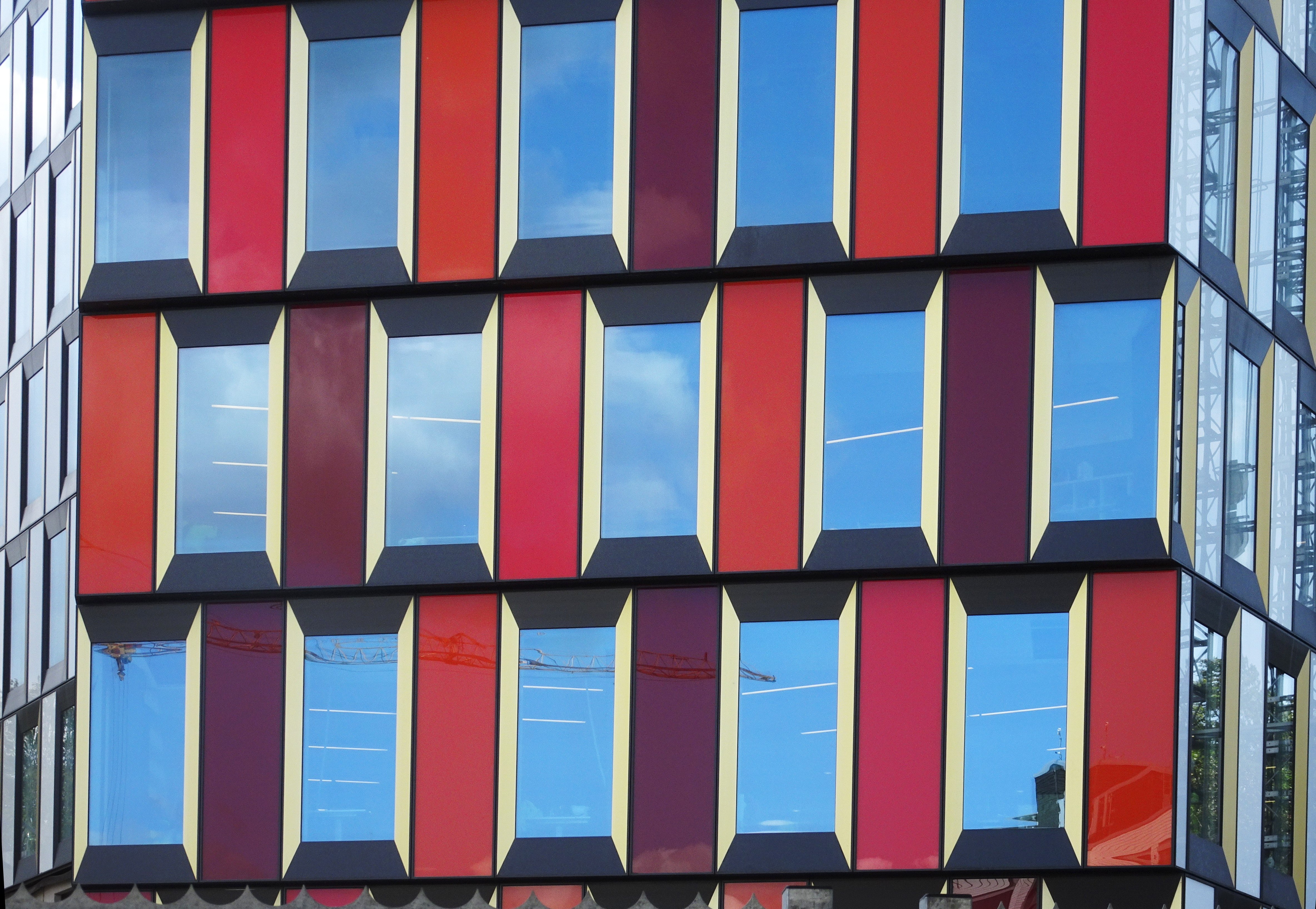 Sthlm 01, Hammarby allé